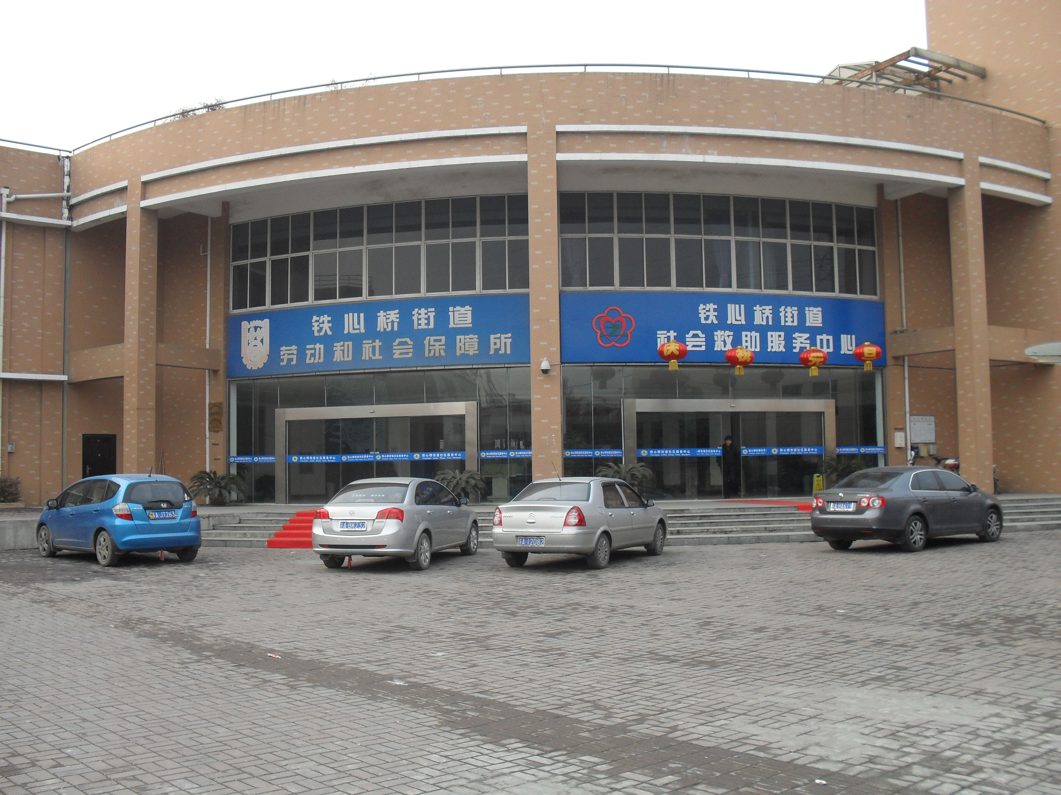 南京铁心桥社区服务中心